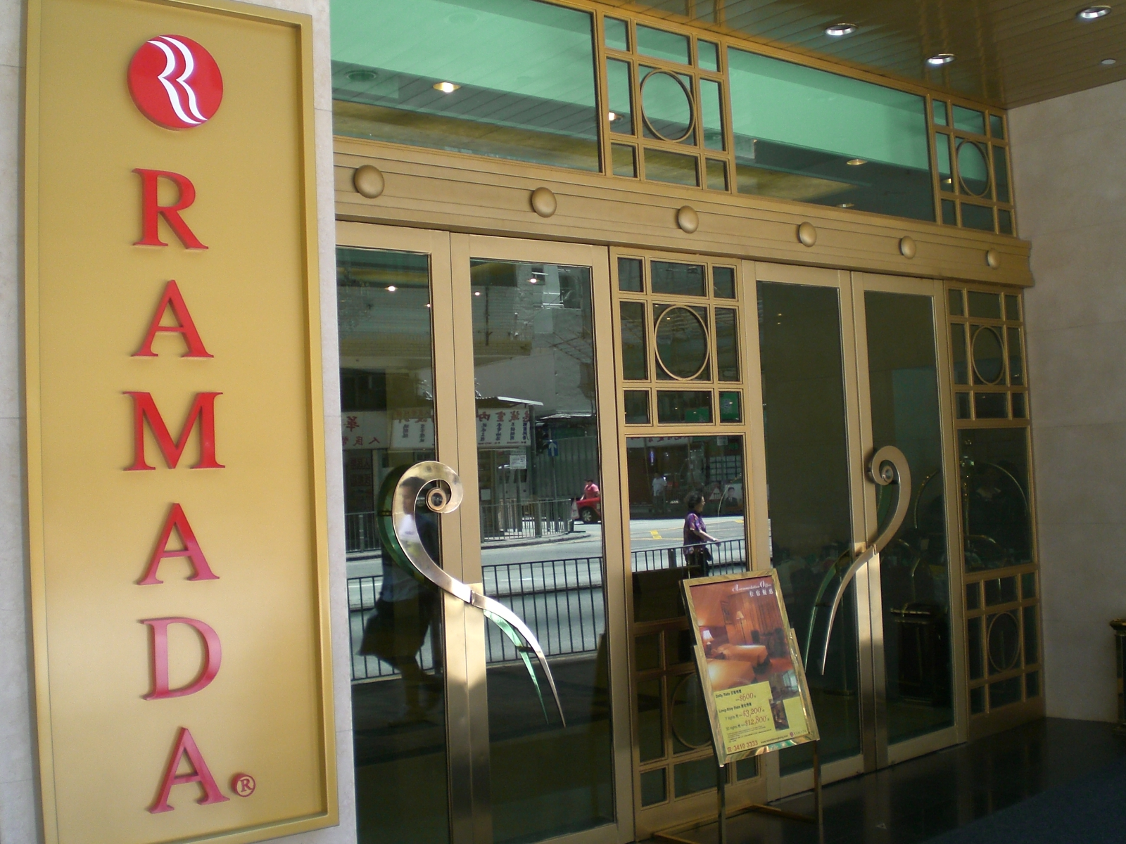 香港華美達酒店, Des Voeux Road West, Hong Kong. Author= Kwanyatsw